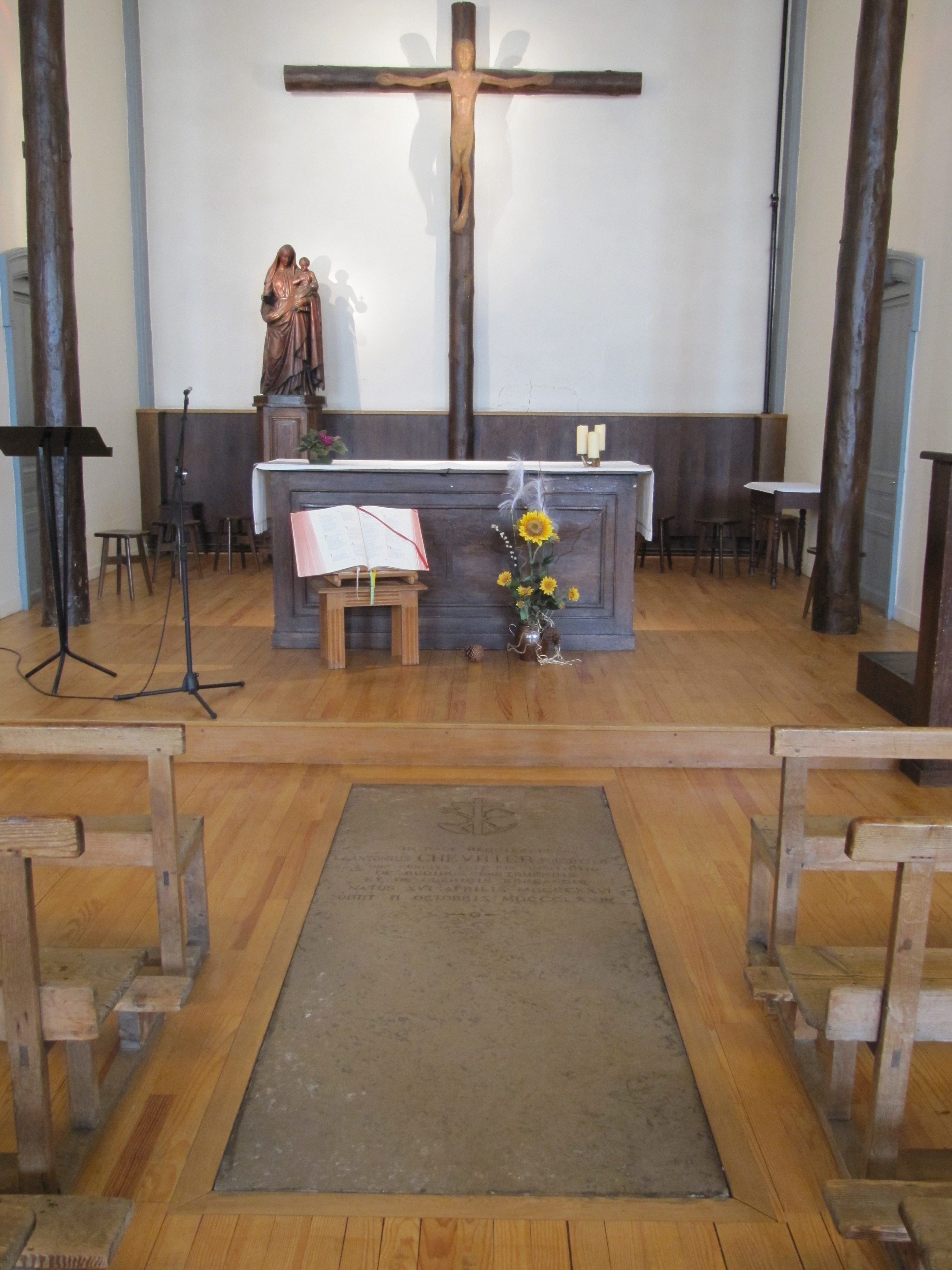 Часовня "Прадо", основанная блаженным Антуаном Шевриером, Лион, Франция